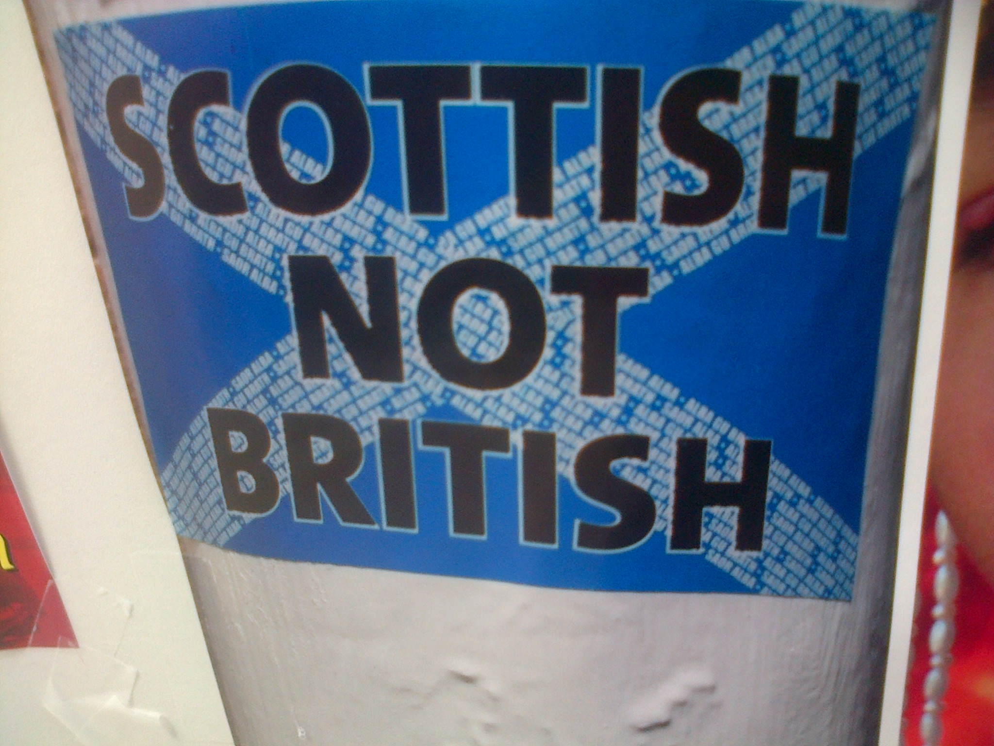 Skosiz ha n'eo ket Saozon pegsun evit dieubidigezh Bro Skoz.